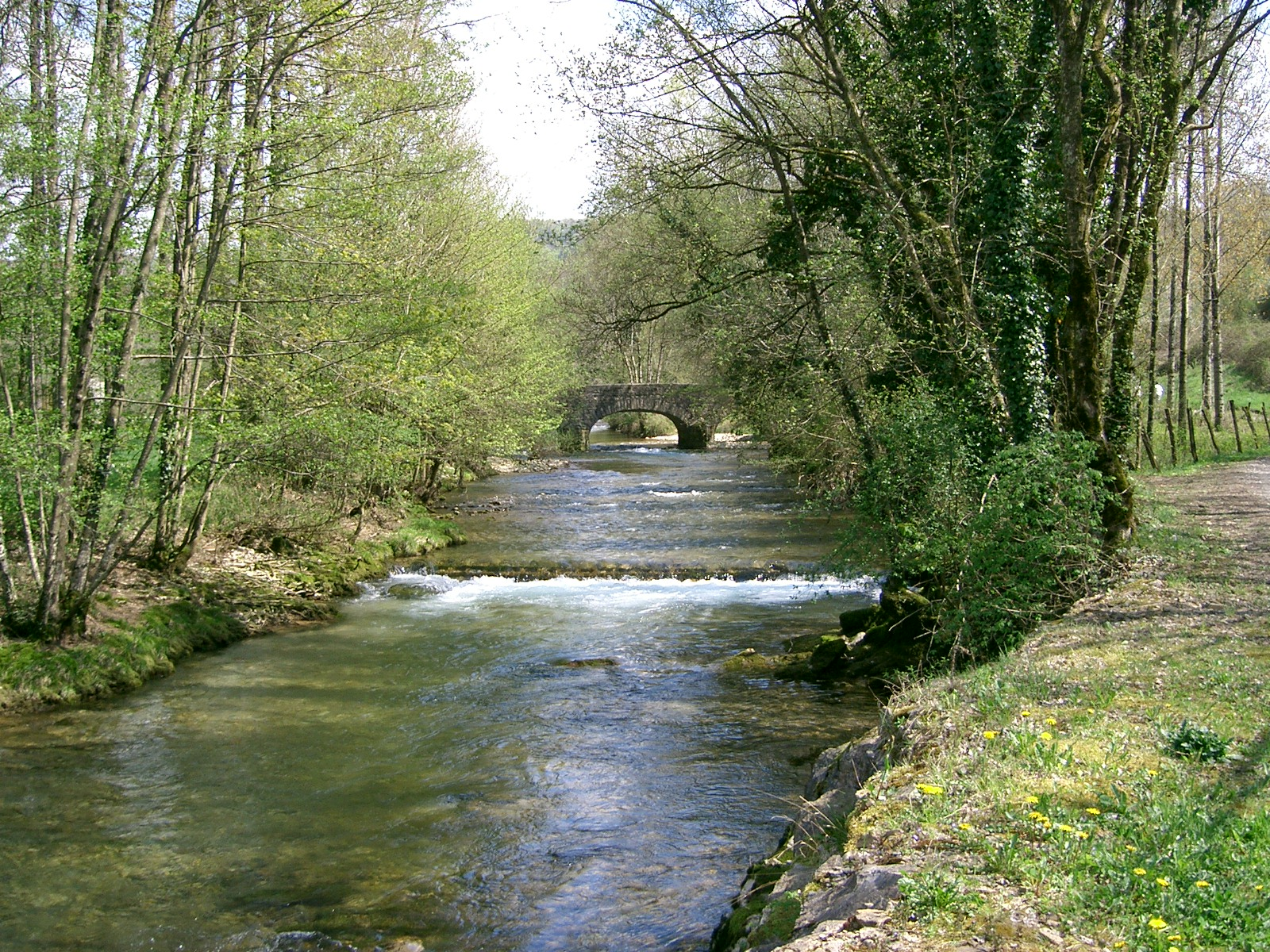 Pont sur la Seille, à l'entrée de Nevy-sur-Seille (Jura - France).